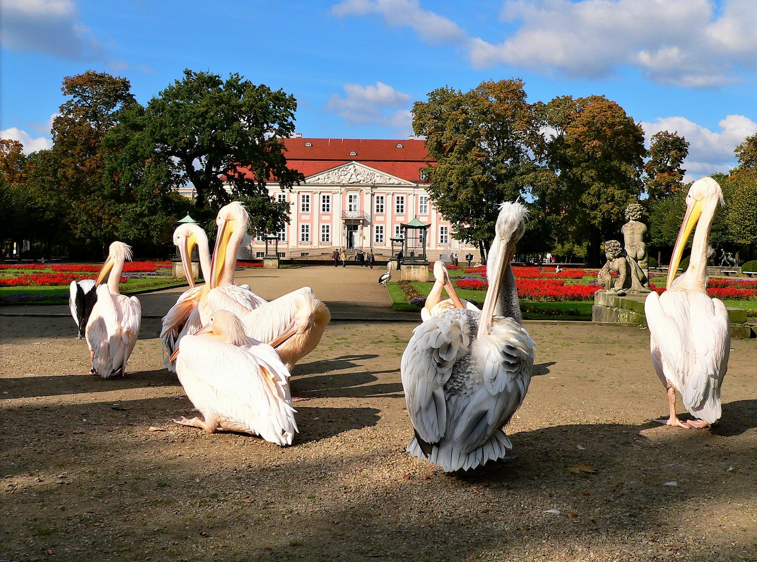 das Schloß in das der "Alte Fritz" seine ungeliebte Gattin verbannt hatte.